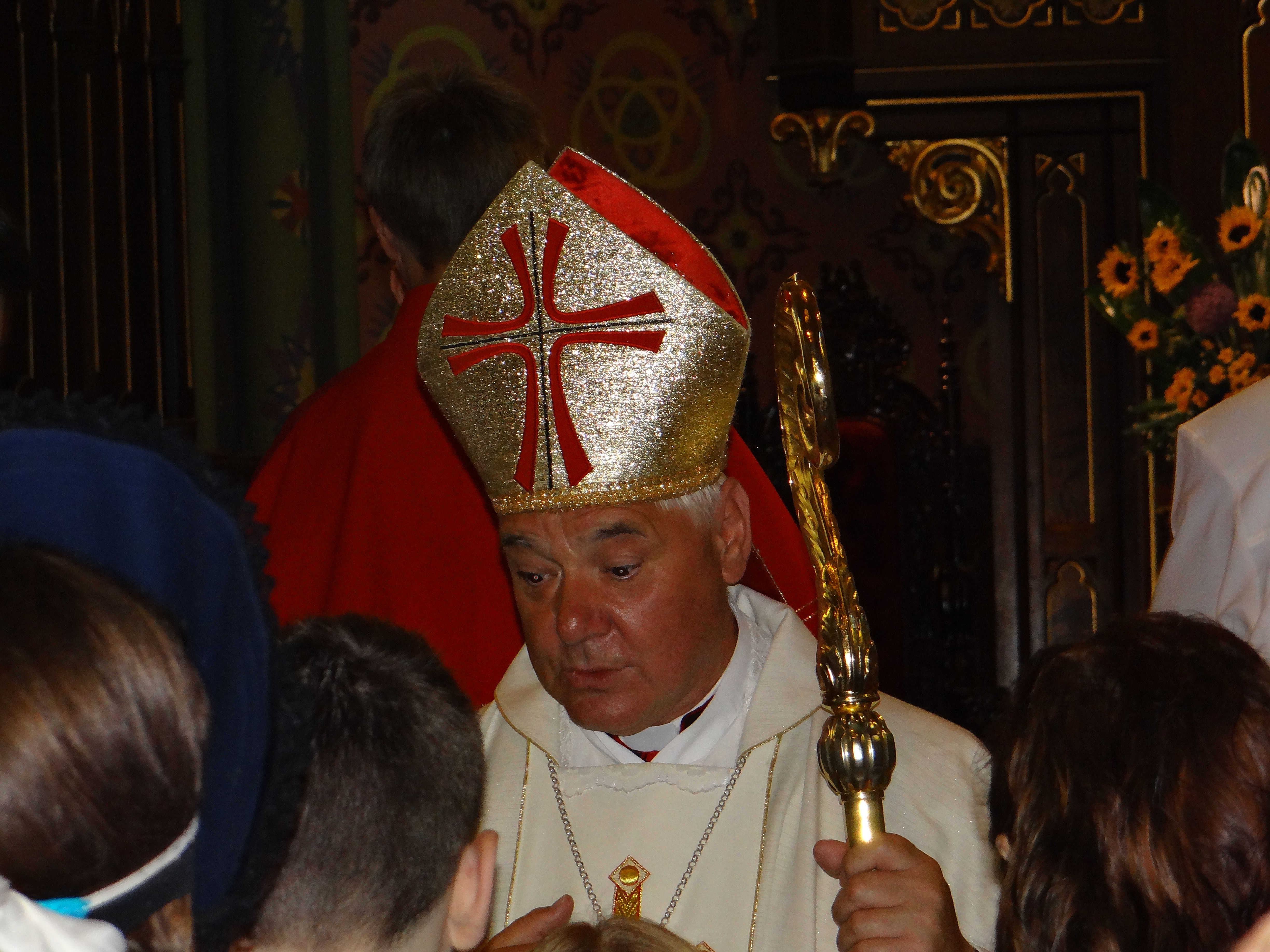 Arcybiskup Gerhard Ludwig Müller w Myszyńcu podczas celebry Mszy Świętej z okazji XXXV Miodobrania Kaszubskiego oraz przyznania MU tytułu Honorowego Obywatela Miata Myszyniec""